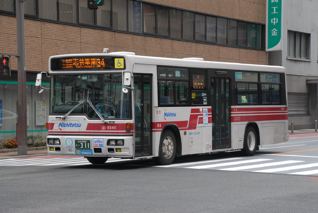 小倉北区にて、2013-6-22撮影